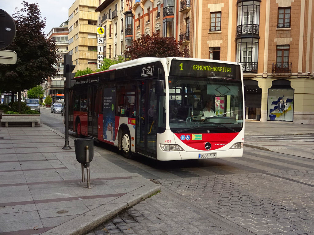 Autobús urbano de León